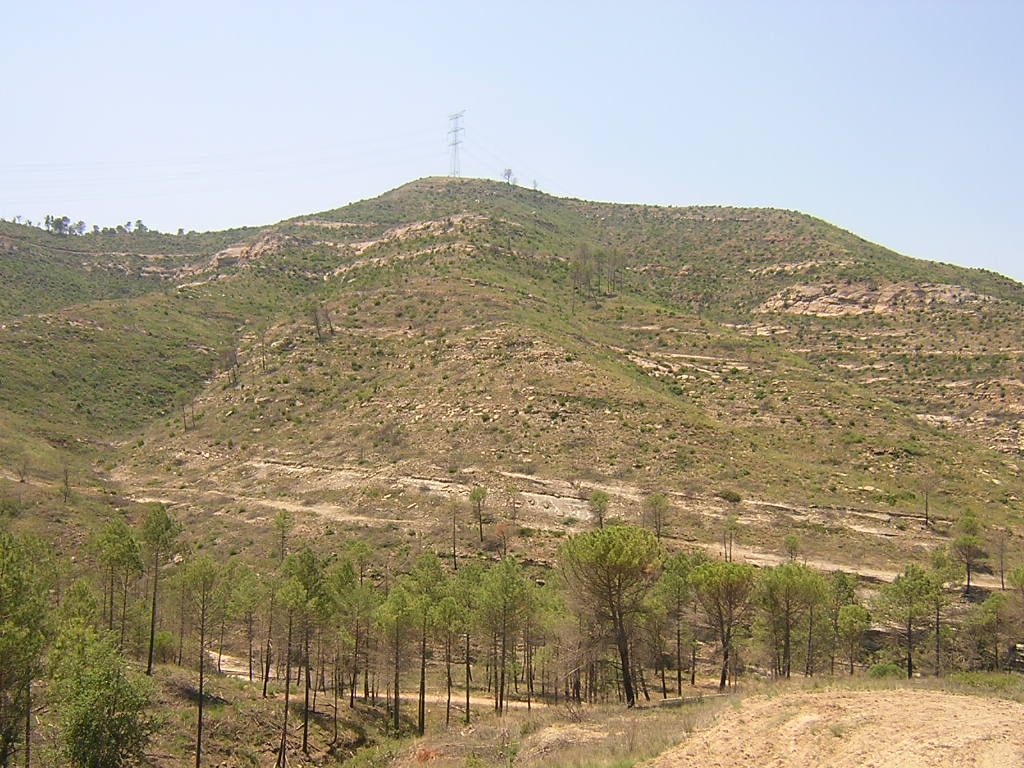 Puig del Rossinyol (Monistrol de Calders, Moianès)